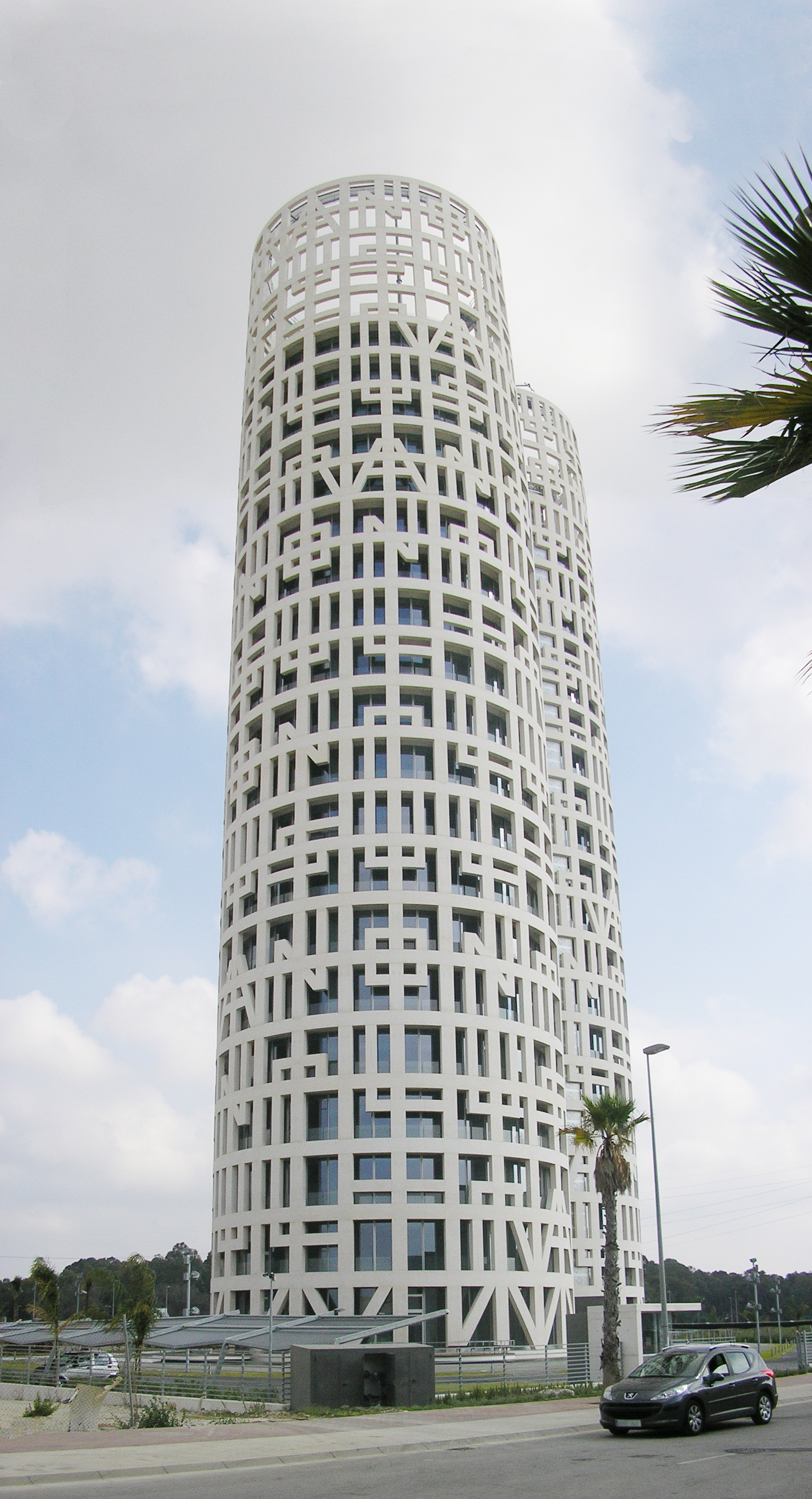 Edificio de las Torres de Hércules bussines center en la localidad andaluza de Los Barrios España